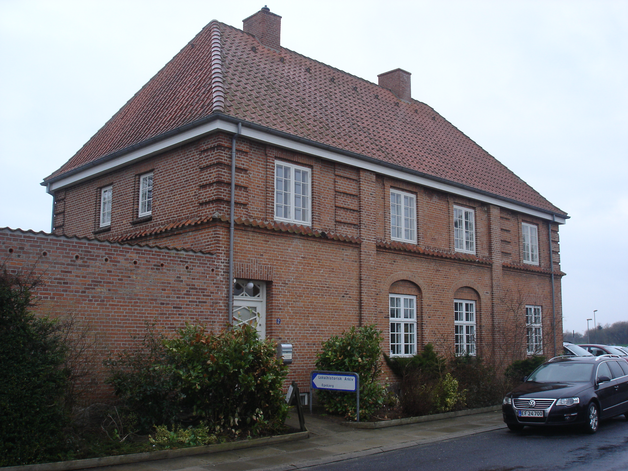 Vester Skerninge Station, vejsiden fra Ø